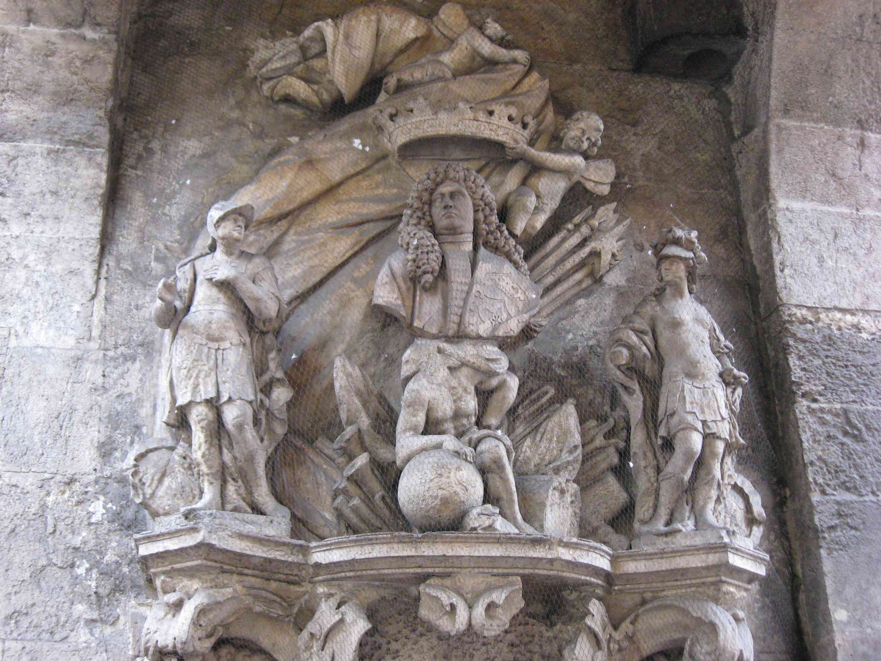 Porta Altinate